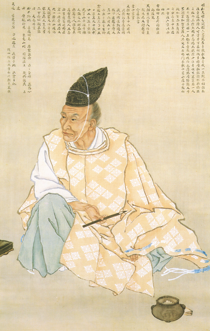 岸駒自画像 絹本着色